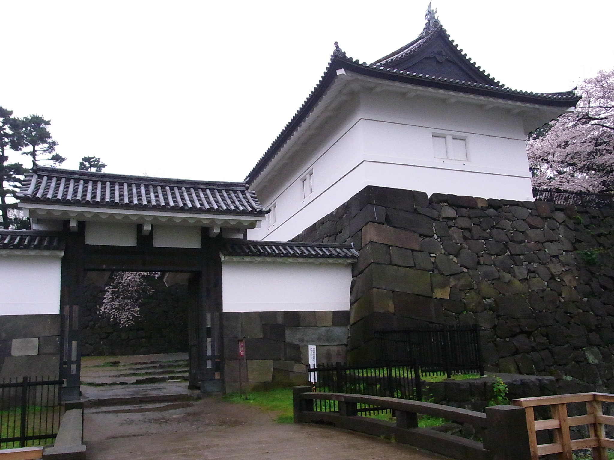 旧江戸城 清水門